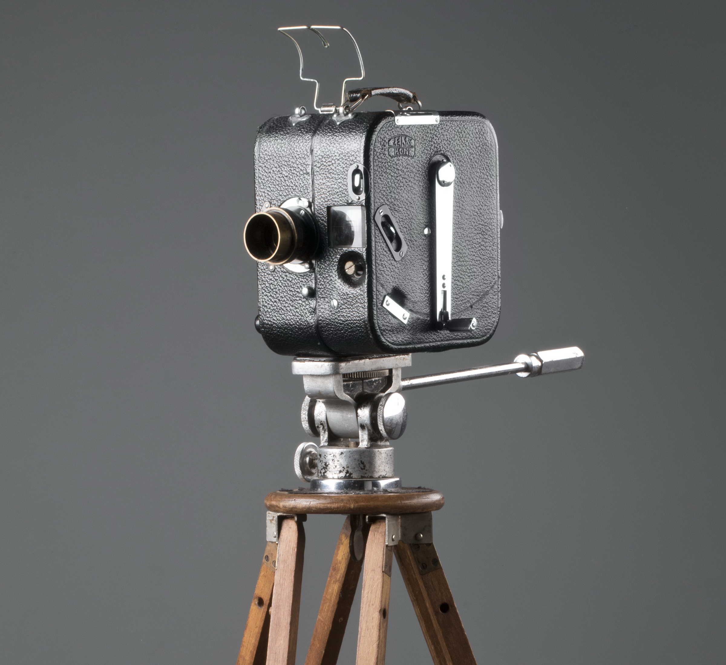 Filmová kamera Zeiss Ikon Kinamo N25 na stativu, pohled ze strany pérového pohonu, detail.